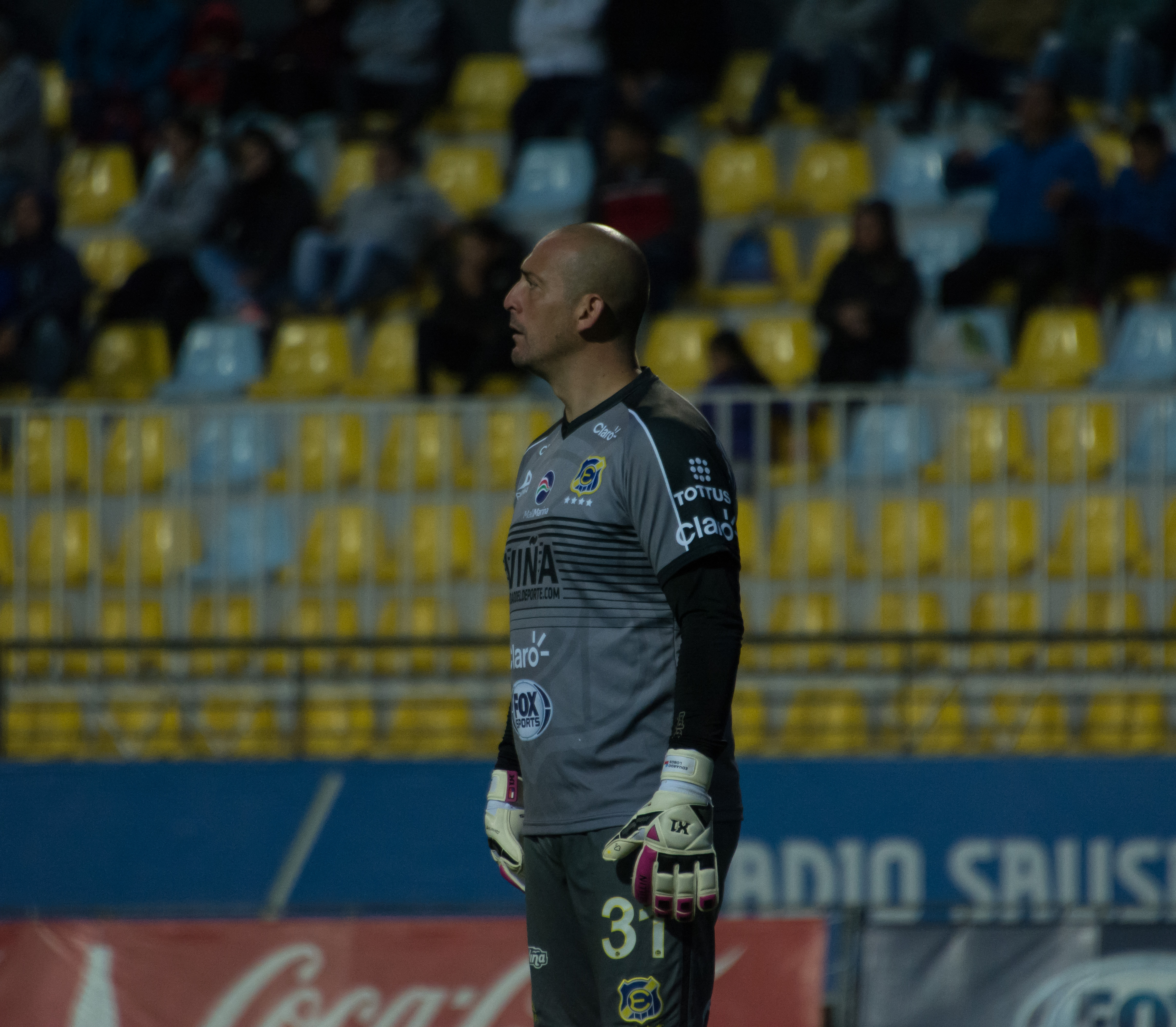 Everton v Unión Española, Estadio Sausalito, Viña del Mar, Chile.